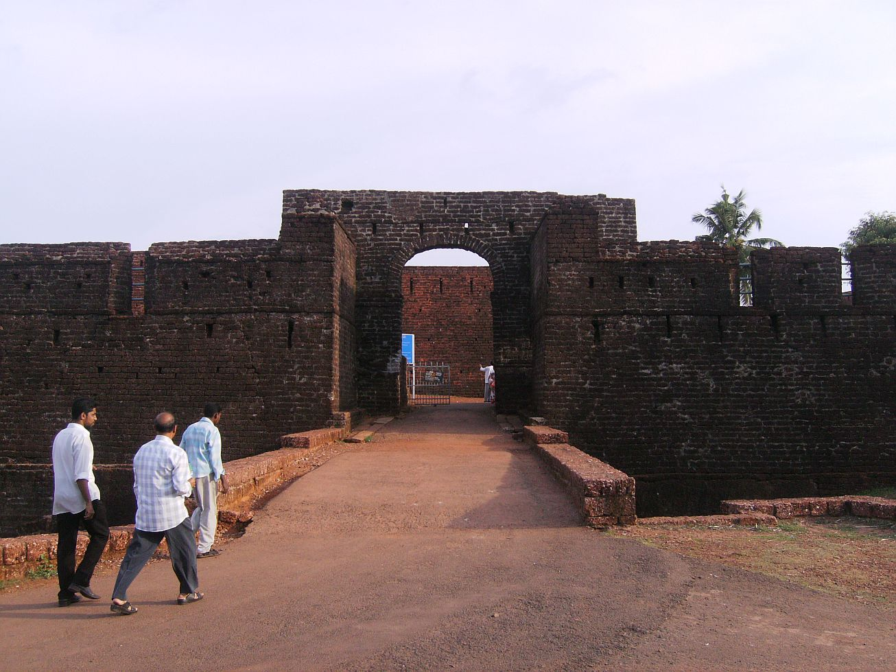 ബേക്കൽ കോട്ട